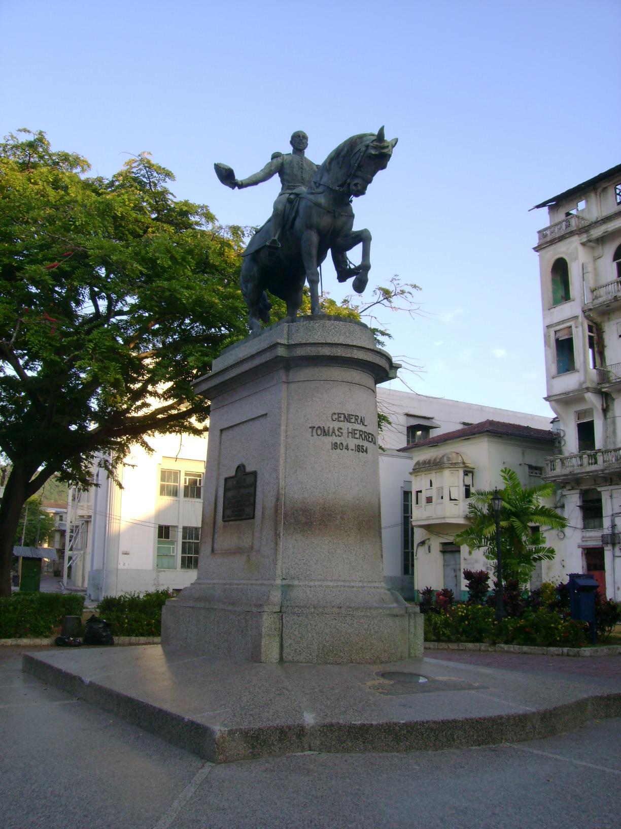 Ecultura del general Tomas Herrera en Plaza Herrera, Casco Antiguo, Ciudad de Panama.